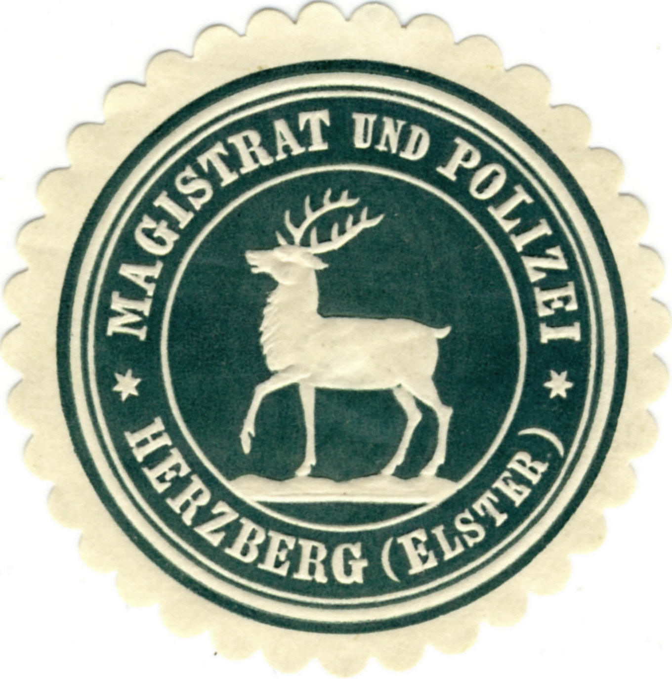 Siegelmarke von Herzberg/Elster